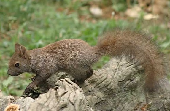 Sciurus vulgaris in France.